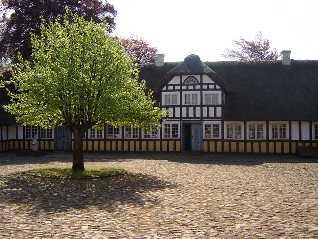 Gårdspladsen på den firlængede Vestfyns Hjemstavnsgård, Klaregade 23, Gummerup